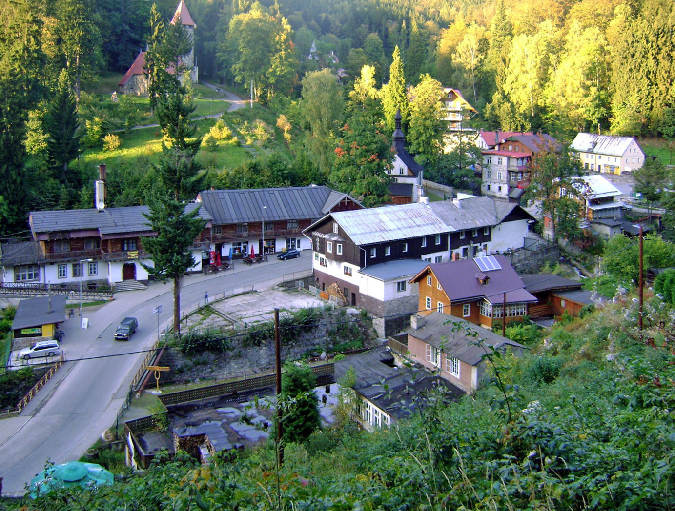 Międzygórze - historyczny układ urbanistyczny, XVI-XX w. (zabytek A/2570/680/WŁ)